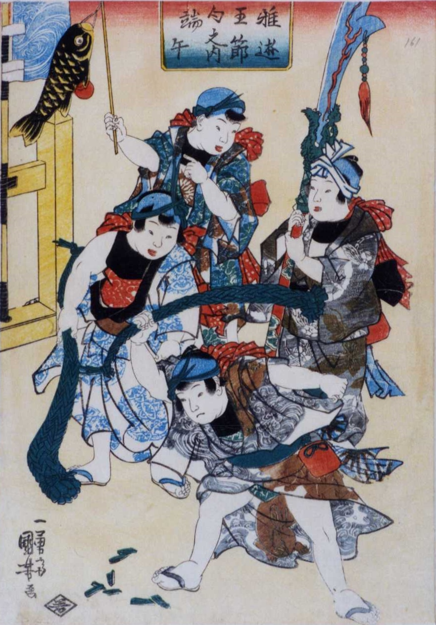 稚遊五節句之内 端午